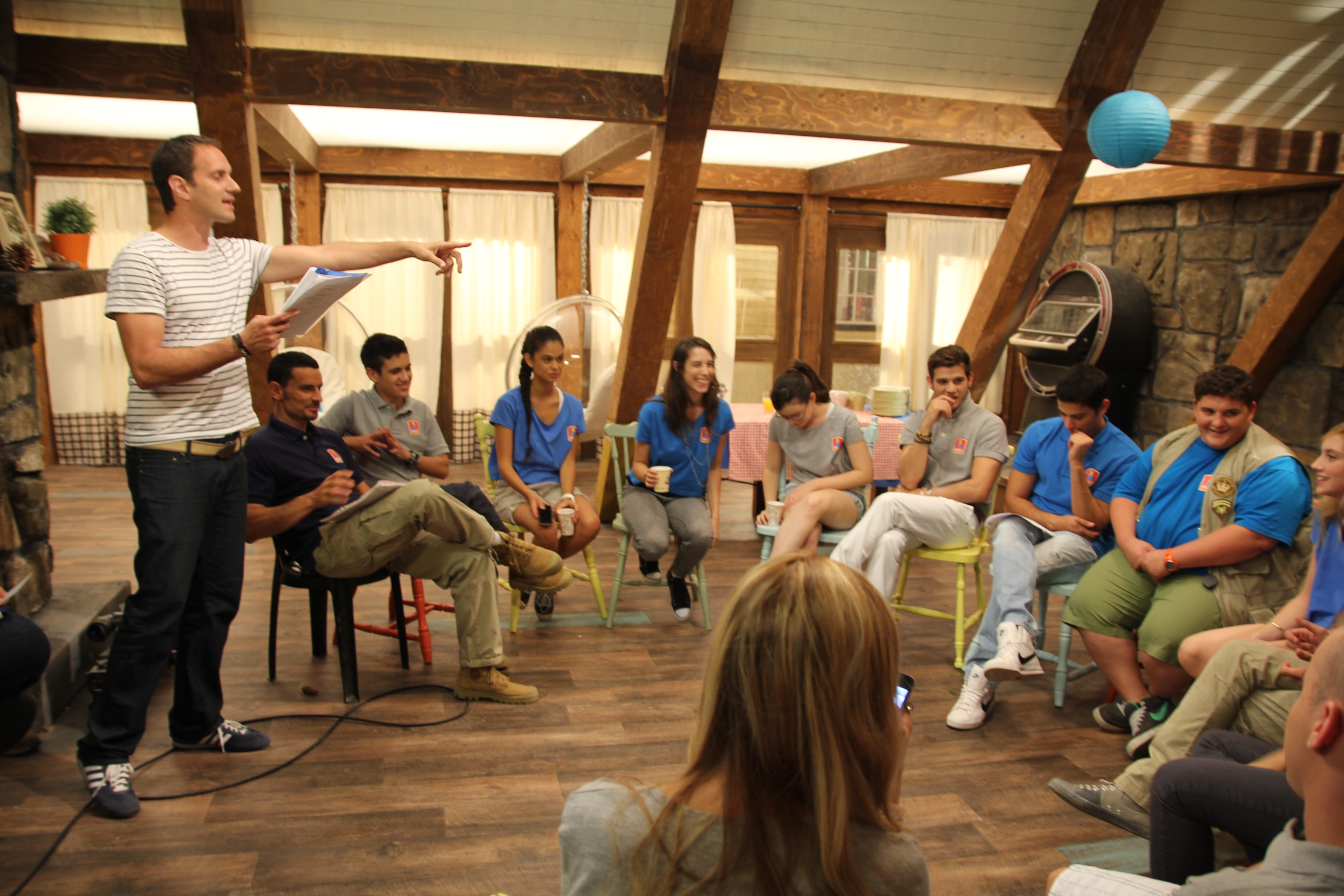 תמונה מתוך הסט של סדרת הטלוויזיה גאליס